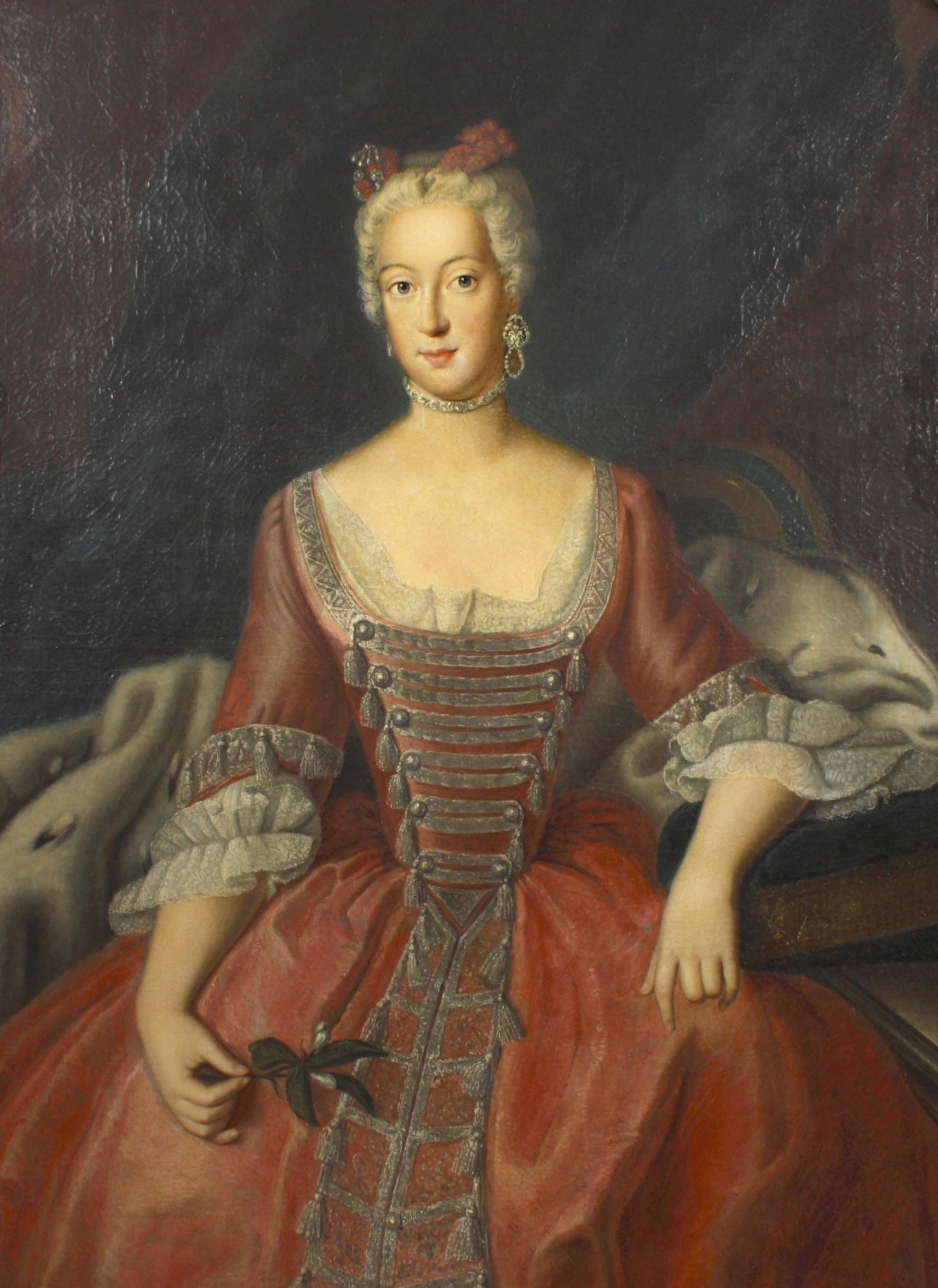 Wilhelmine von Preußen (1709–1758) Staatsporträt